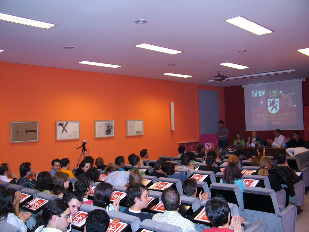 Imagen de un Congreso de Conceyu Xoven en la ciudad de León